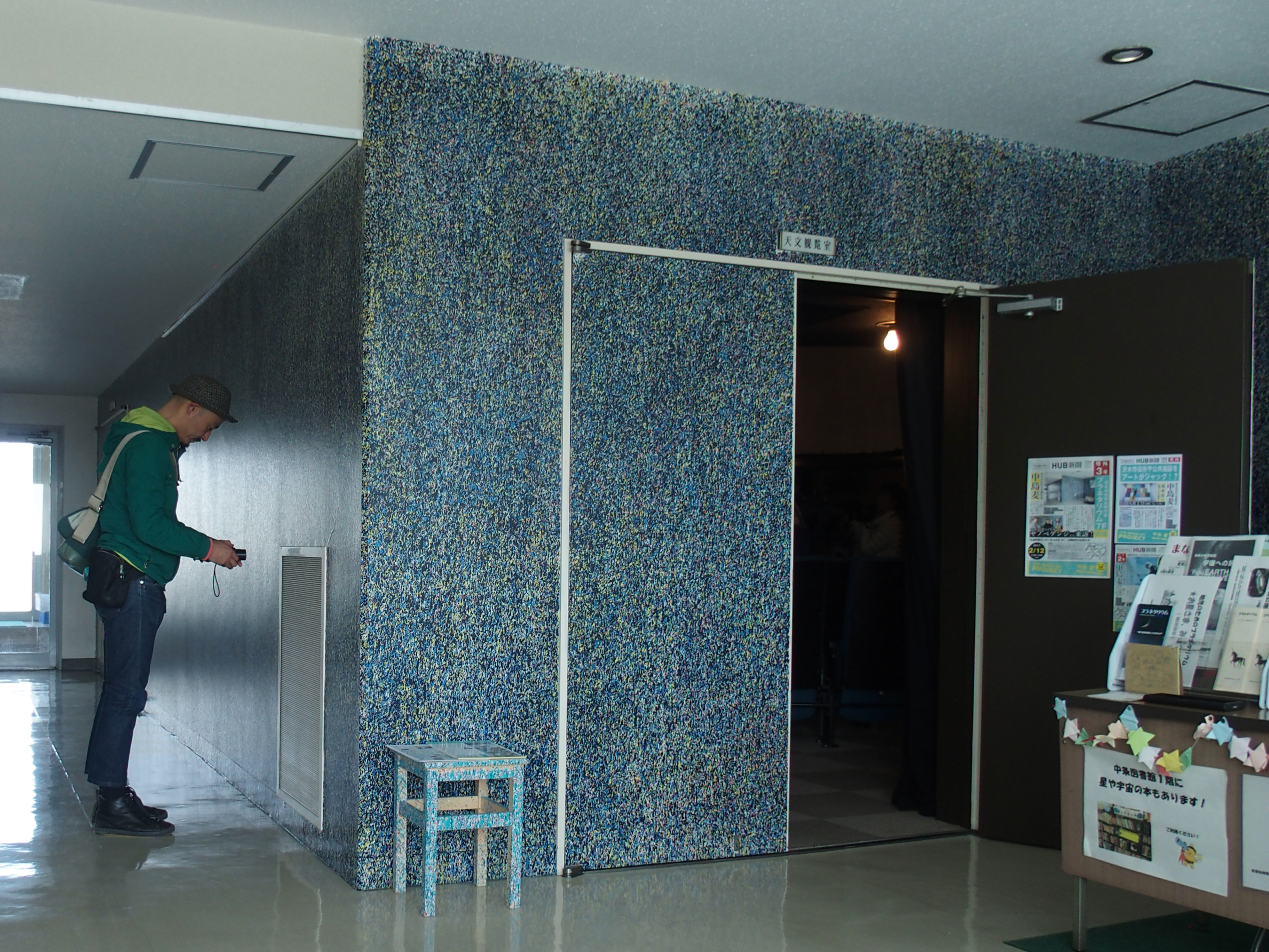 HUB-IBARAKI ART PROJECT 中島麦氏本人と共に